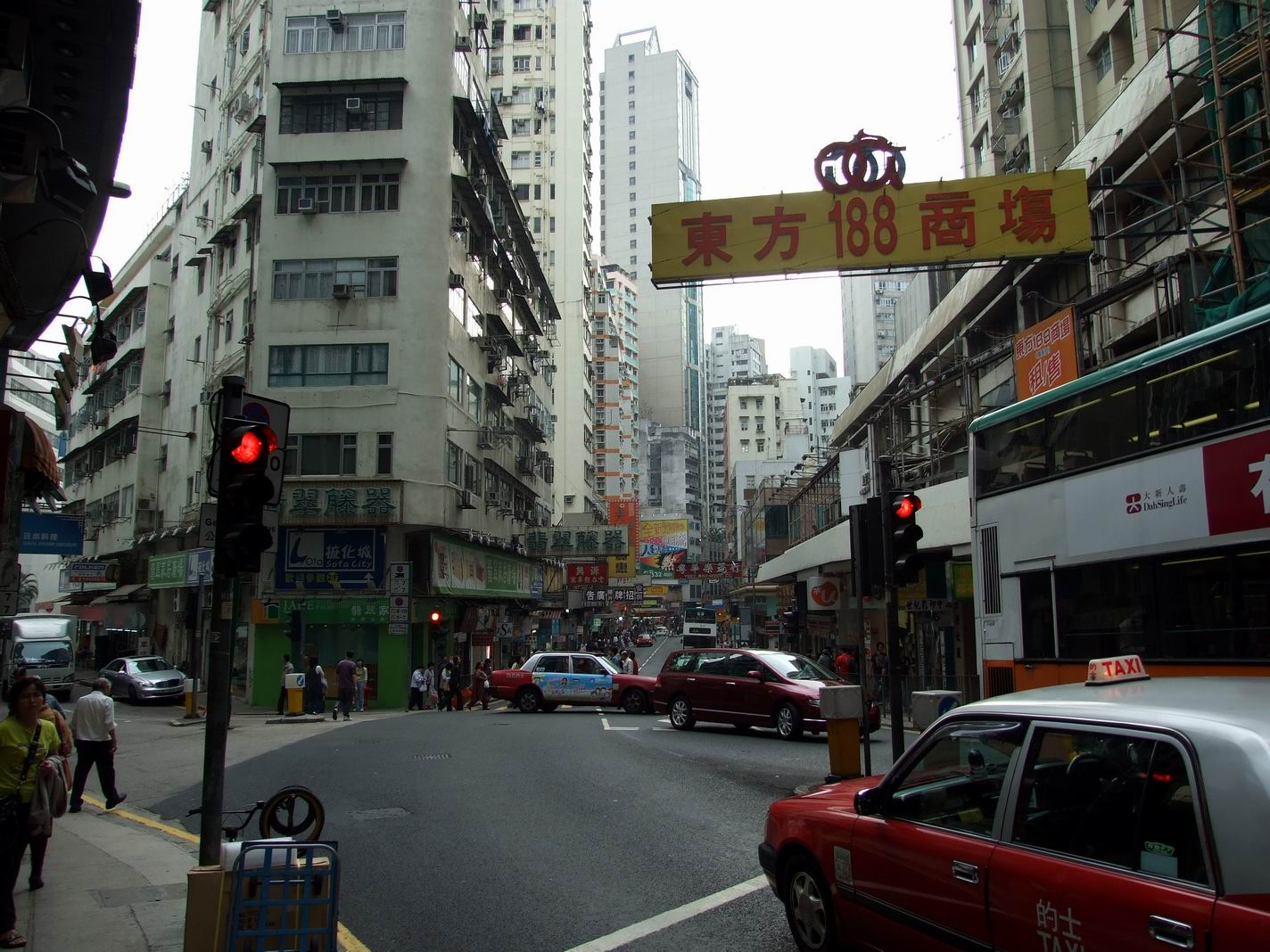 灣仔道近集成中心